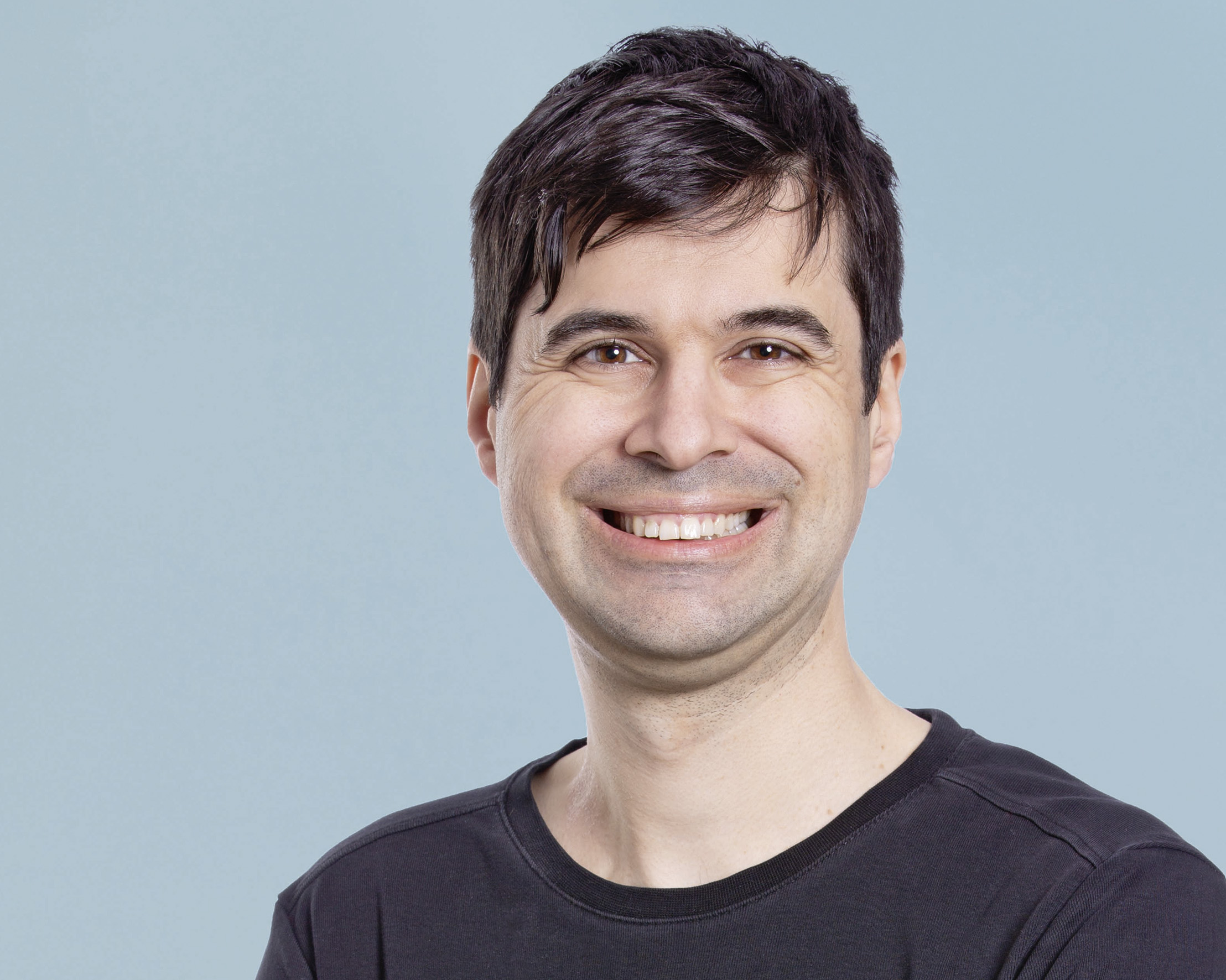 Samuel Bendahan, conseiller national socialiste (VD)